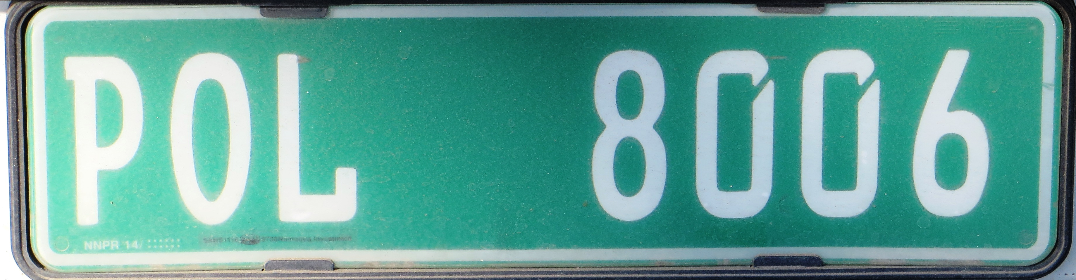 politie plaat Namibië